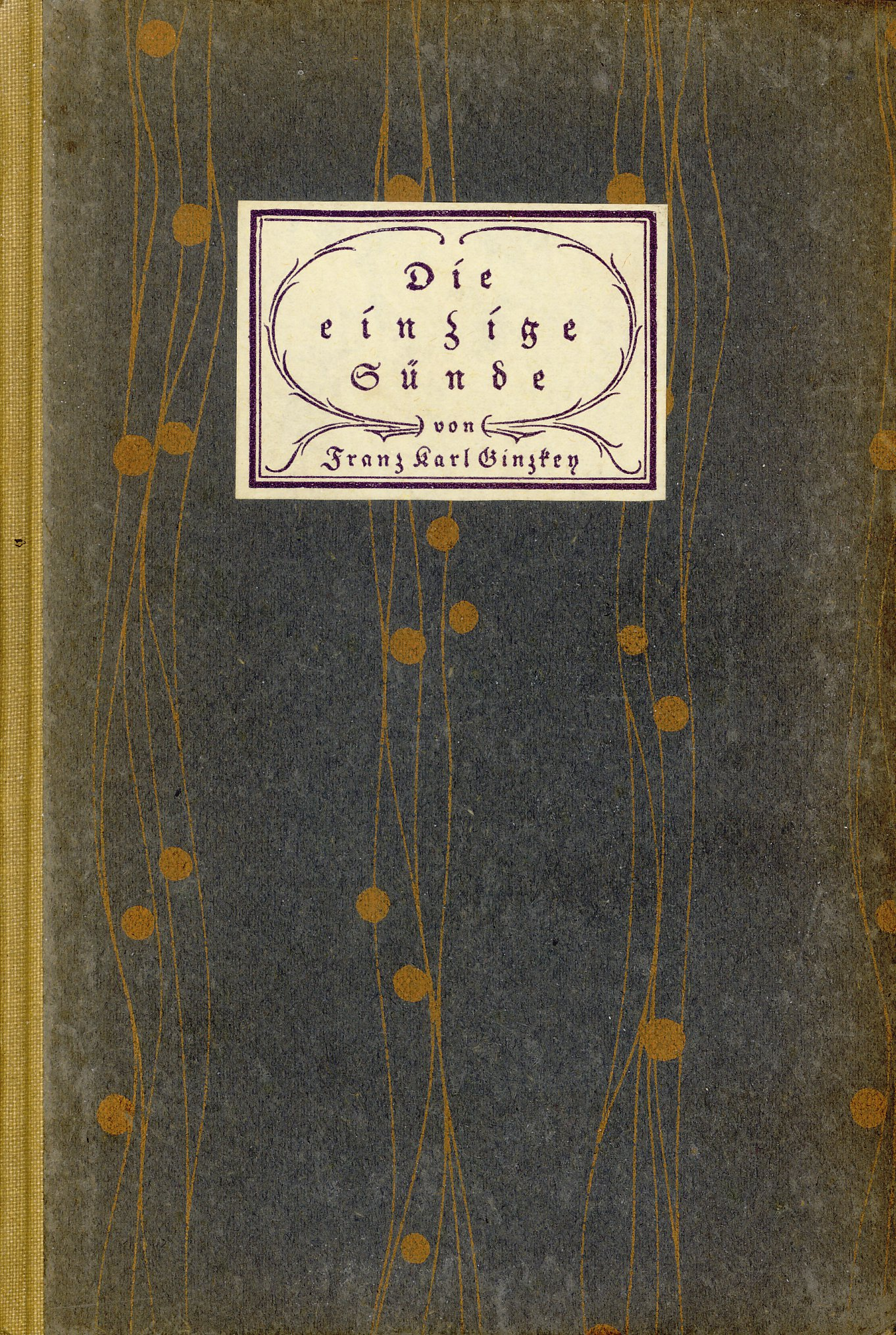 Franz Karl Ginzkey: Die einzige Sünde. L. Staackmann, Leipzig 1920. Erstausgabe